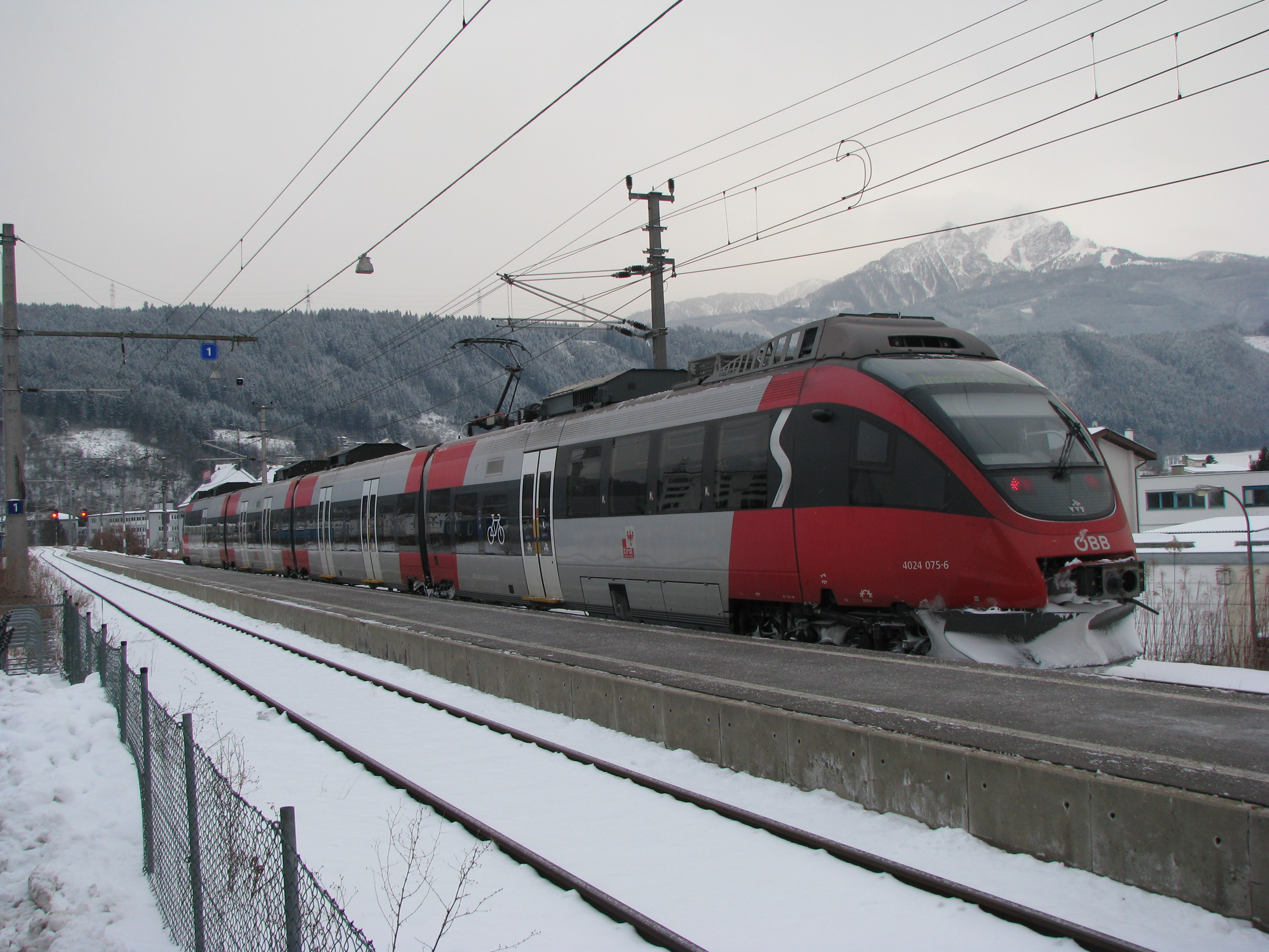 S-Bahn nach Innsbruck Hbf am Bahnhof Innsbruck-Hötting